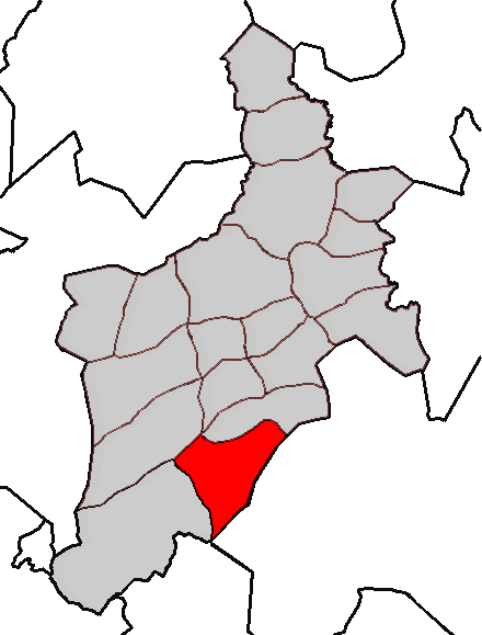 Situación da parroquia de Vilacova no concello de Abegondo